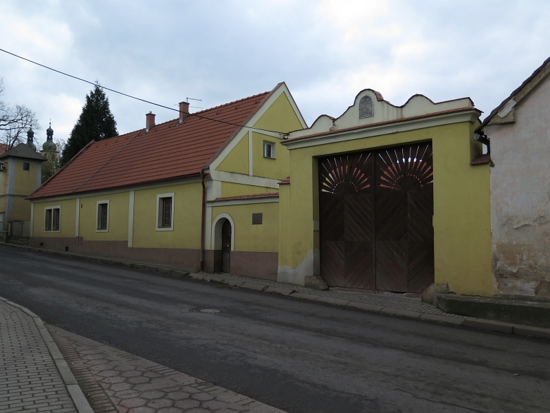 Blahošovský dvůr, náměstí Míru 27, Dýšina.